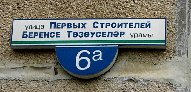 улица г. Агидель